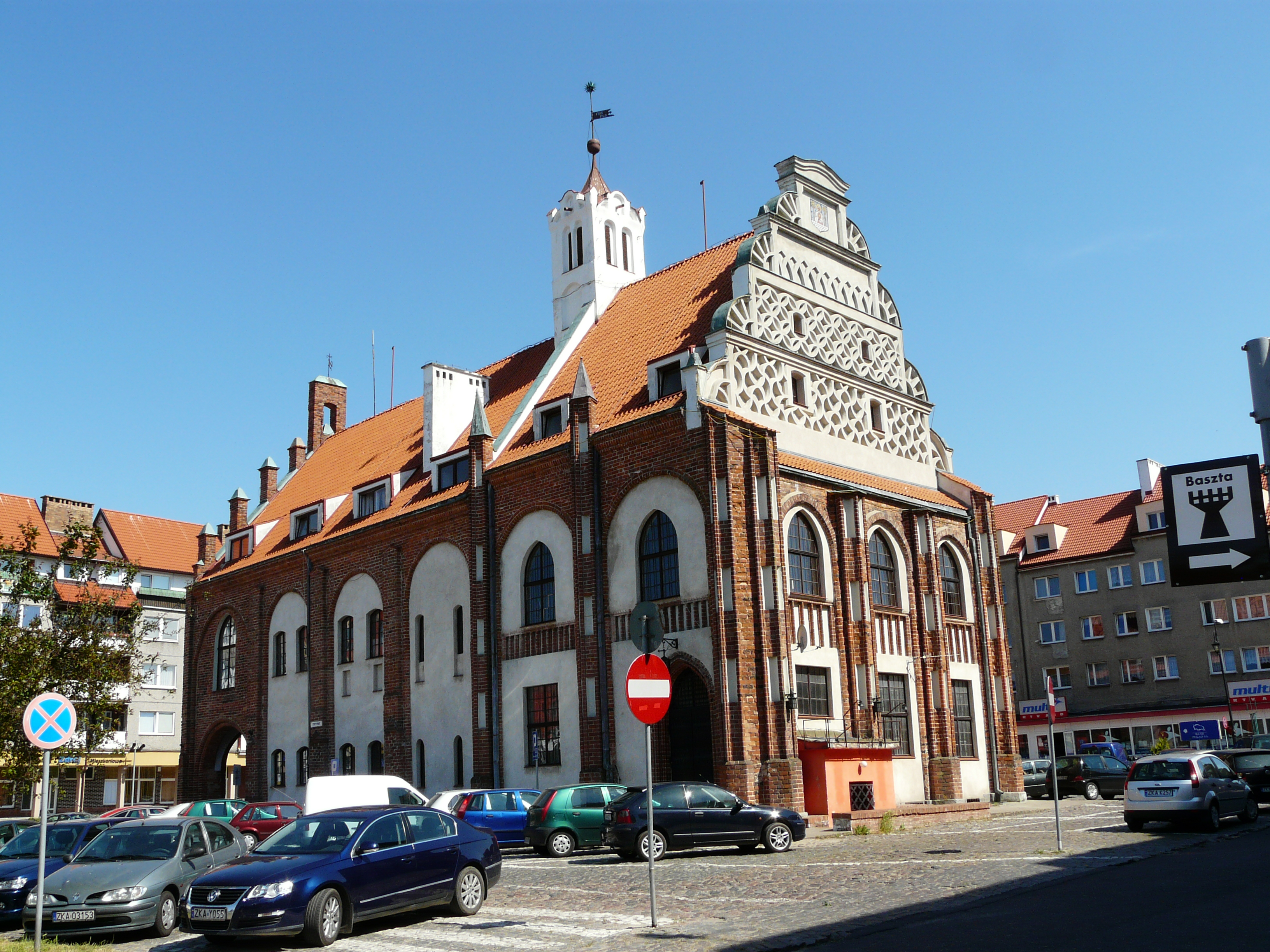 Radnice v Kamienu Pomorskiem, Západopomořanské vojvodství, Polsko